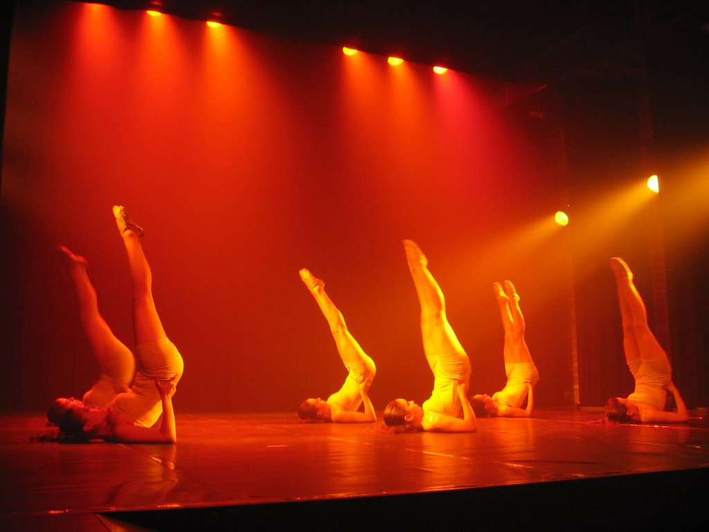 Grupo de Dança Odara em apresentação na Casa da Ribeira. Natal (Brasil).